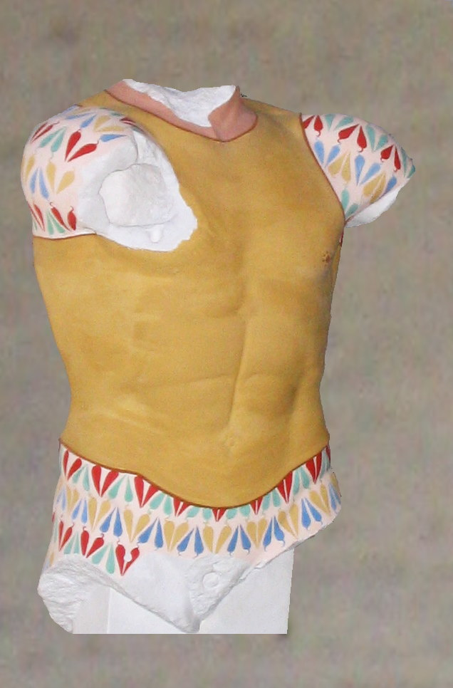 Bemalter Panzertorso; Rekonstruktion eines Panzertorsos der Athener Akropolis in der Glyptothek München.